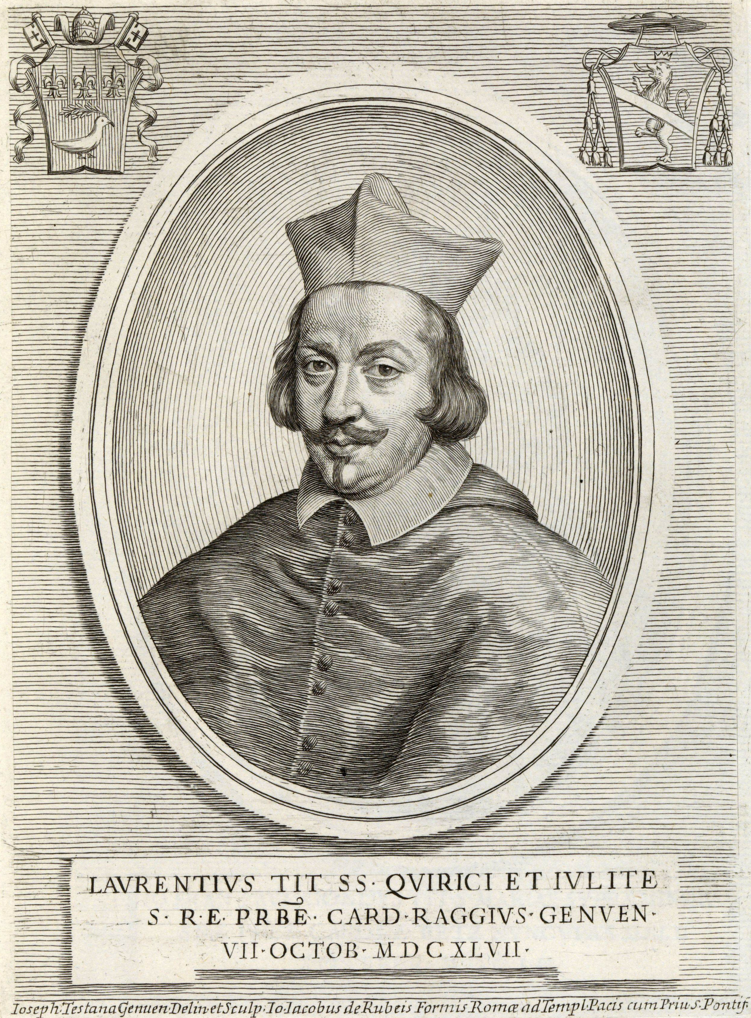 Portrait du cardinal Lorenzo Raggi (1615-1687)